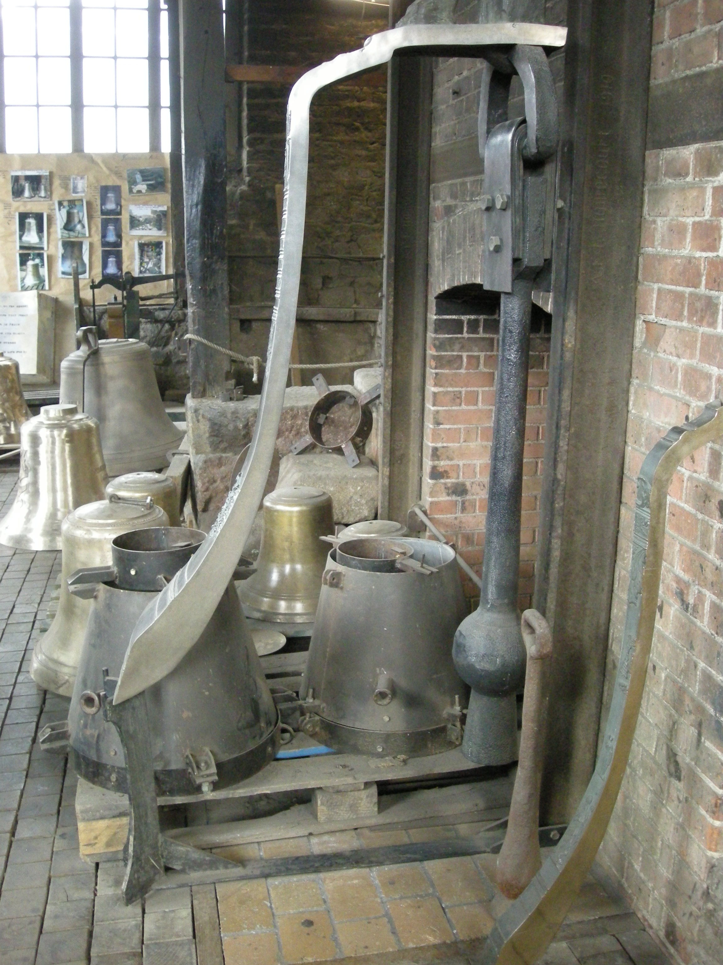 Fonderie Cornille-Havard à Villedieu-les-Poêles (Manche, Normandie). Epaisseur de la cloche visible en coupe.